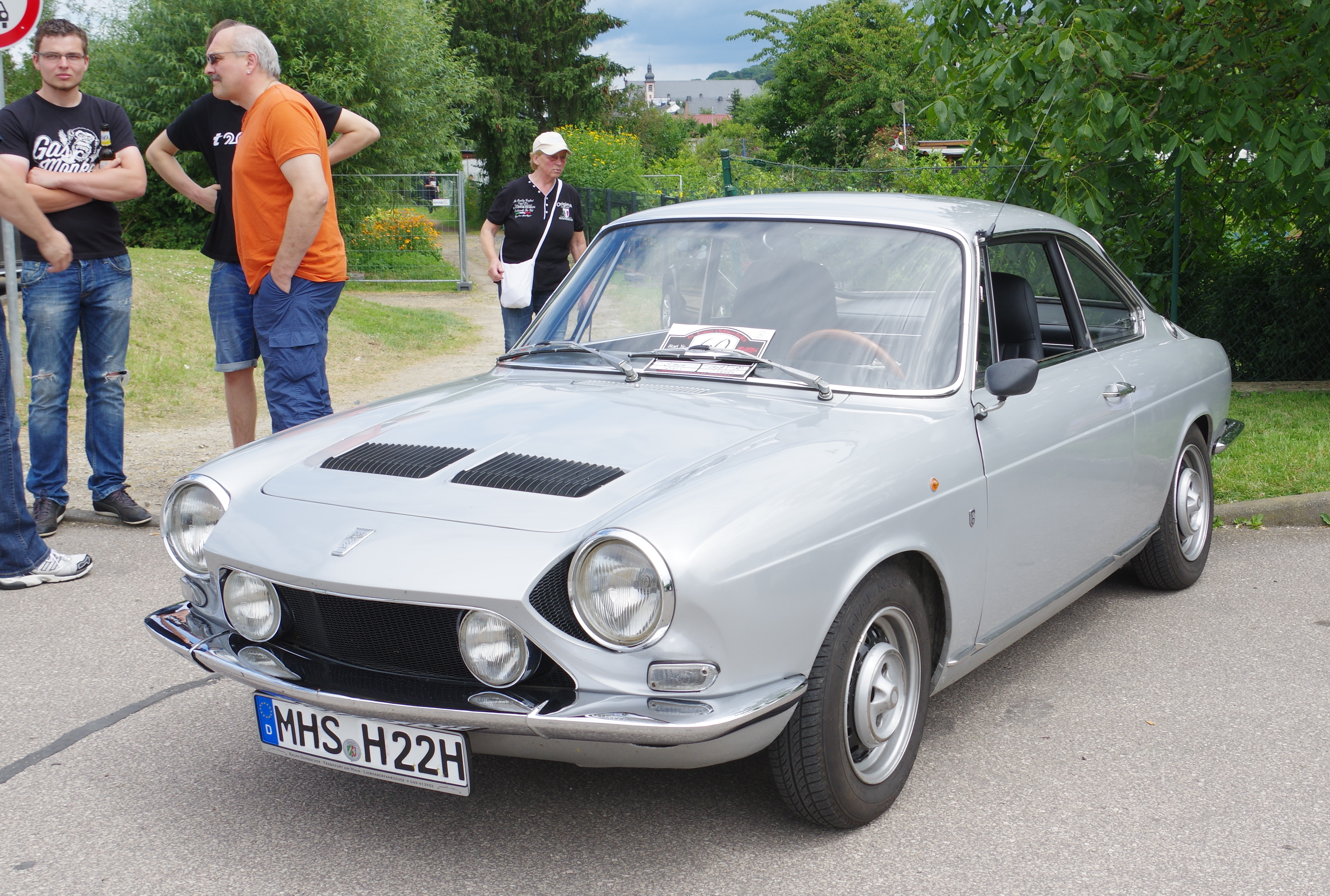 Simca 1200 S, 1968, 80 PS, 32. Internationales Oldtimer Treffen Konz 2016, Das Nummernschild ist verfälscht!